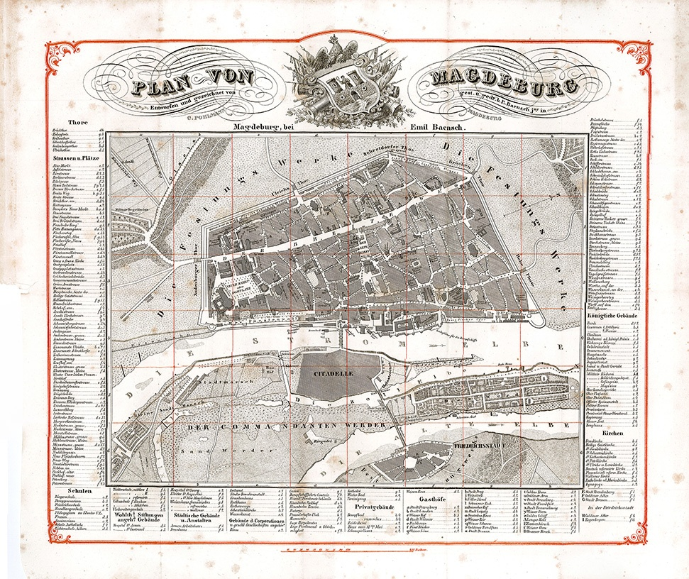 Gesamtansicht Papier im Querformat einseitig bedruckt.Motiv: In rotem Schmuckrahmen Stadtplan von Magdeburg, vermutlich im Zeitraum von 1855 bis 1865.Zu sehen ist der heutige Stadtkern Magdeburgs vom Magdeburger Dom, Neuem Markt, Altem Markt bis zur St. Jacobi-Kirche in der ehemaligen Stadtmauer. Ebenfalls eingezeichnet ist die Elbe sowie der Werder. Der Maßstab ist in Ruthen angegeben. Vermutlich gehörte der Stadtplan zu einem Reise-/Stadtführer.